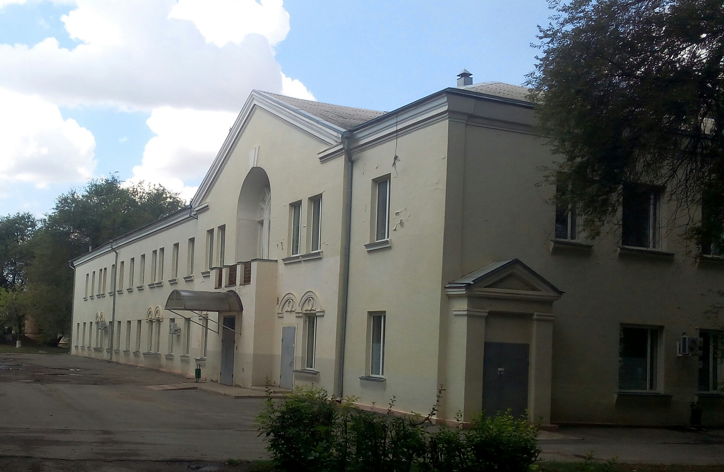 Сальск, корпус неврологического отделения Центральной больницы